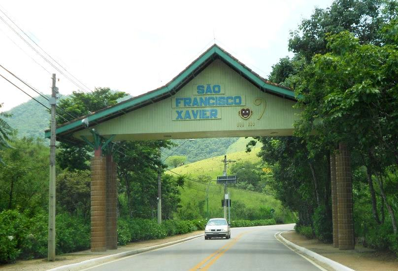 Portal da Vila de São Francisco Xavier